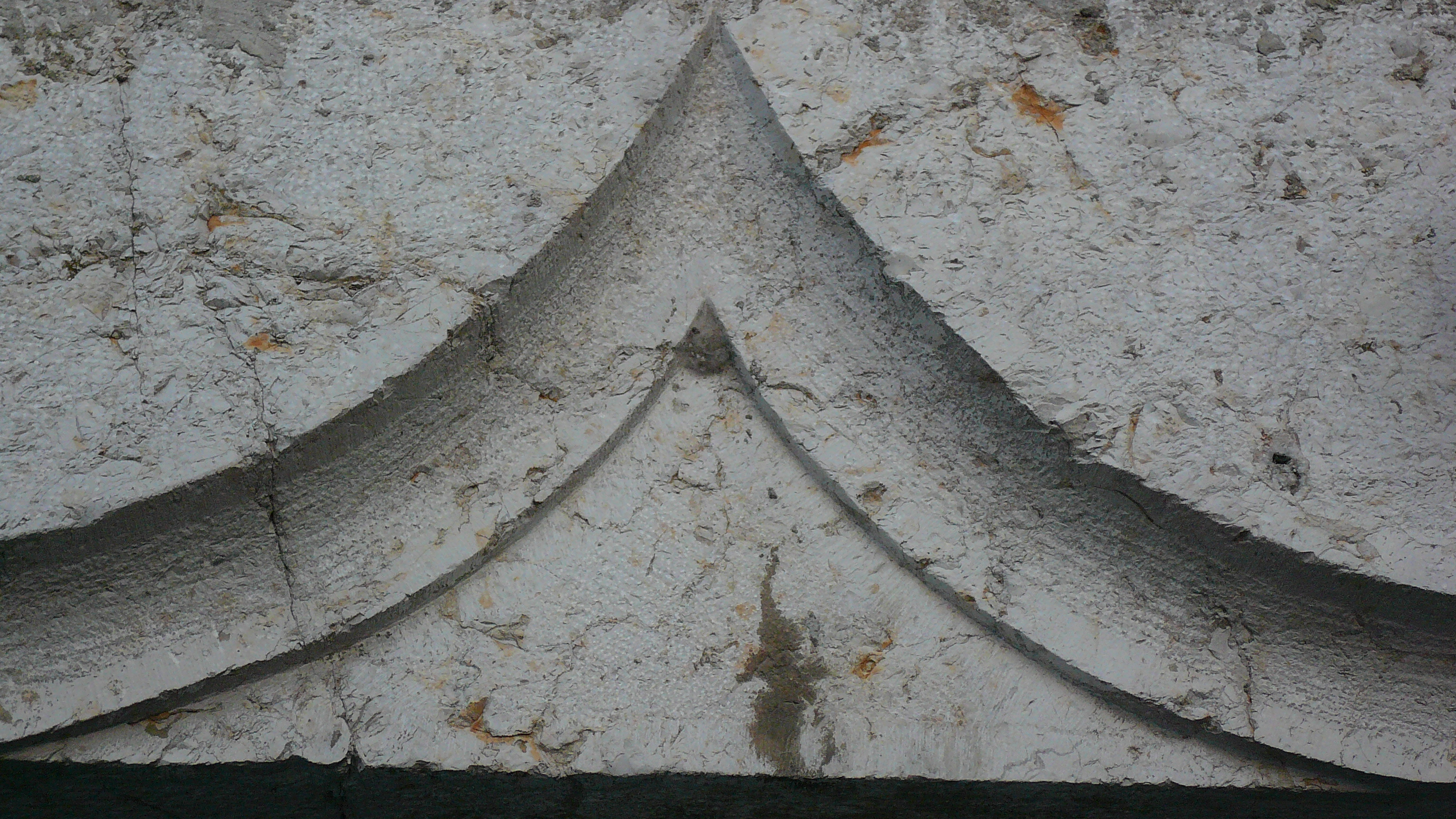 Montbenoît. L'Abbaye. Les fenêtres de la façade ouest. La nef de l'église date du 12e siècle, le choeur du 16e et le clocher a été refait en 1903.